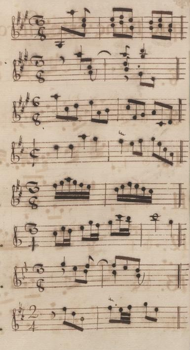 Table du volume III des manuscrits de Venise (incipit des sonates 15 à 22, K. 220 à 227)